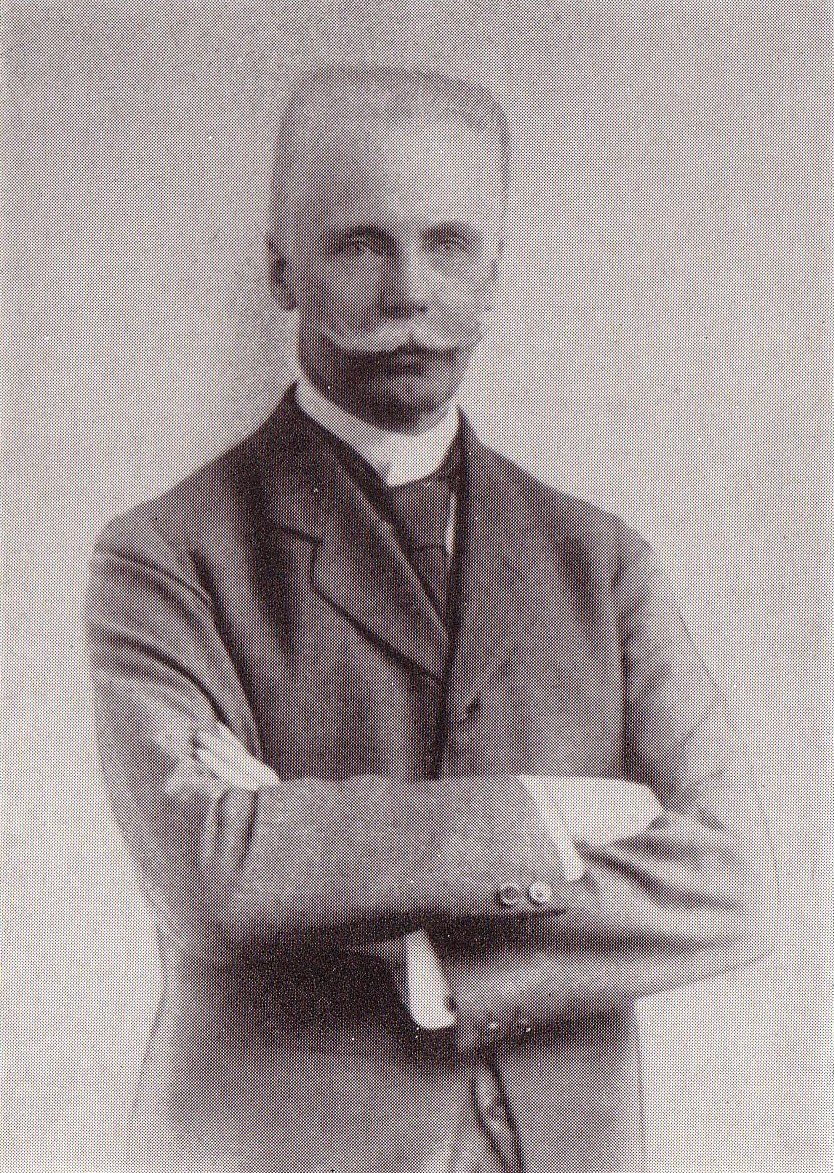 Rudolf von der Schulenburg (1860-1930), Oberpräsident von Brandenburg